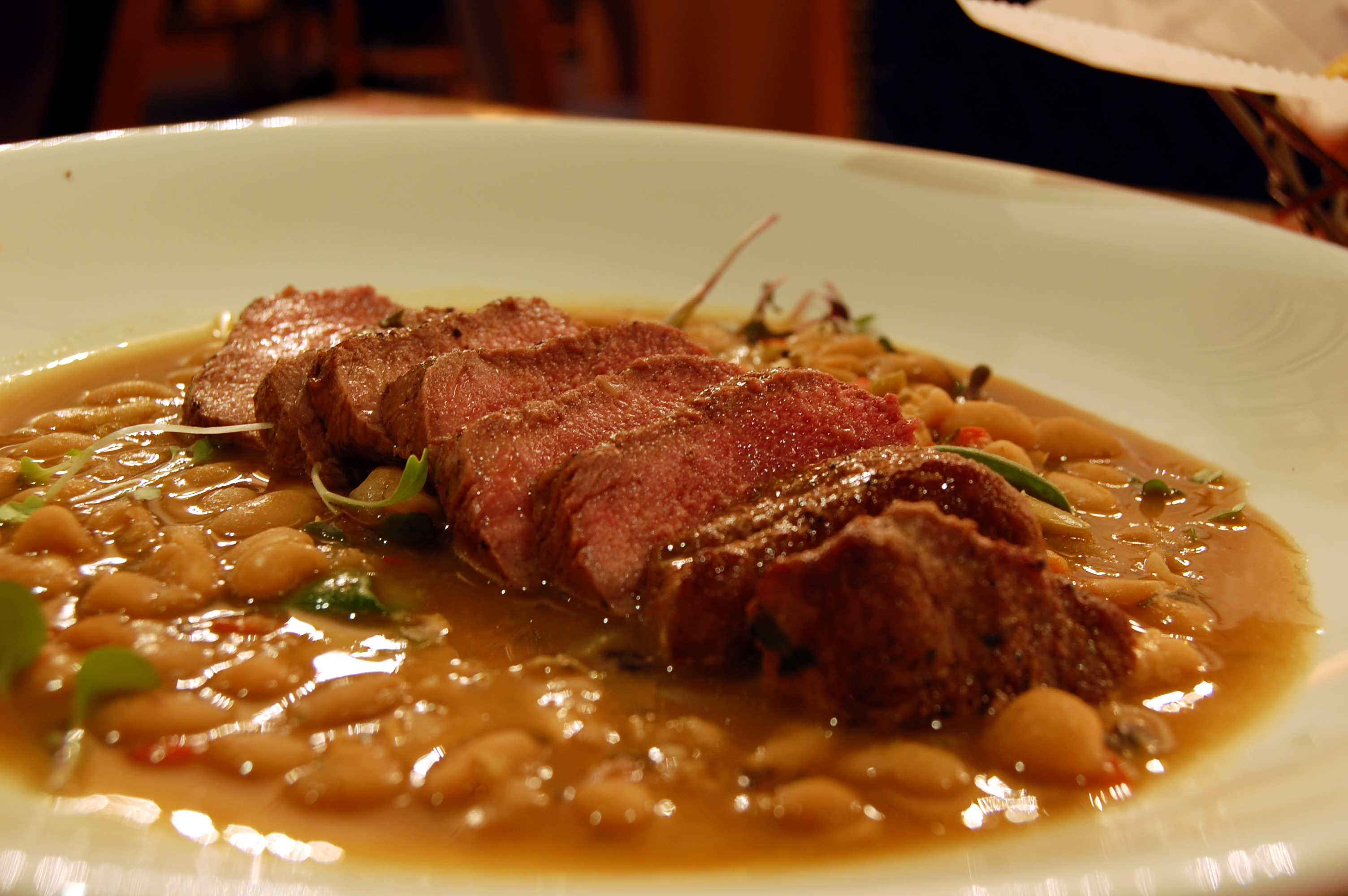 Haricot de mouton à basse de haricots de Soissons